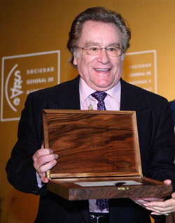 Recibiendo el premio Federico Romero